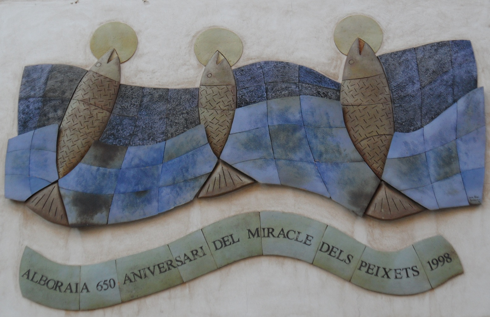 650 aniversari del miracle dels Peixets.